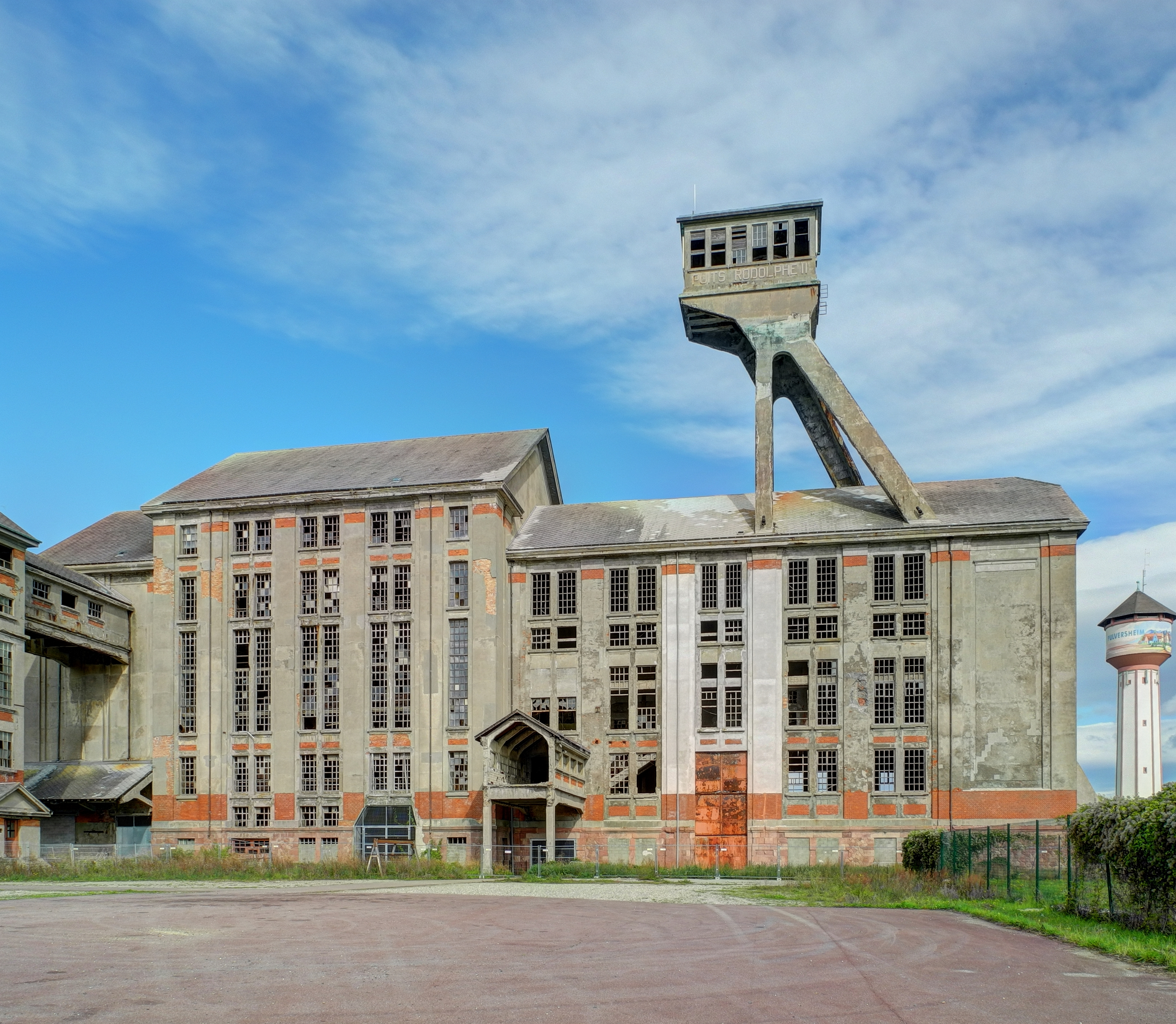 Puits Rodolphe : chevalement du puits Rodolphe II avec le bâtiment adjencent (HDR).